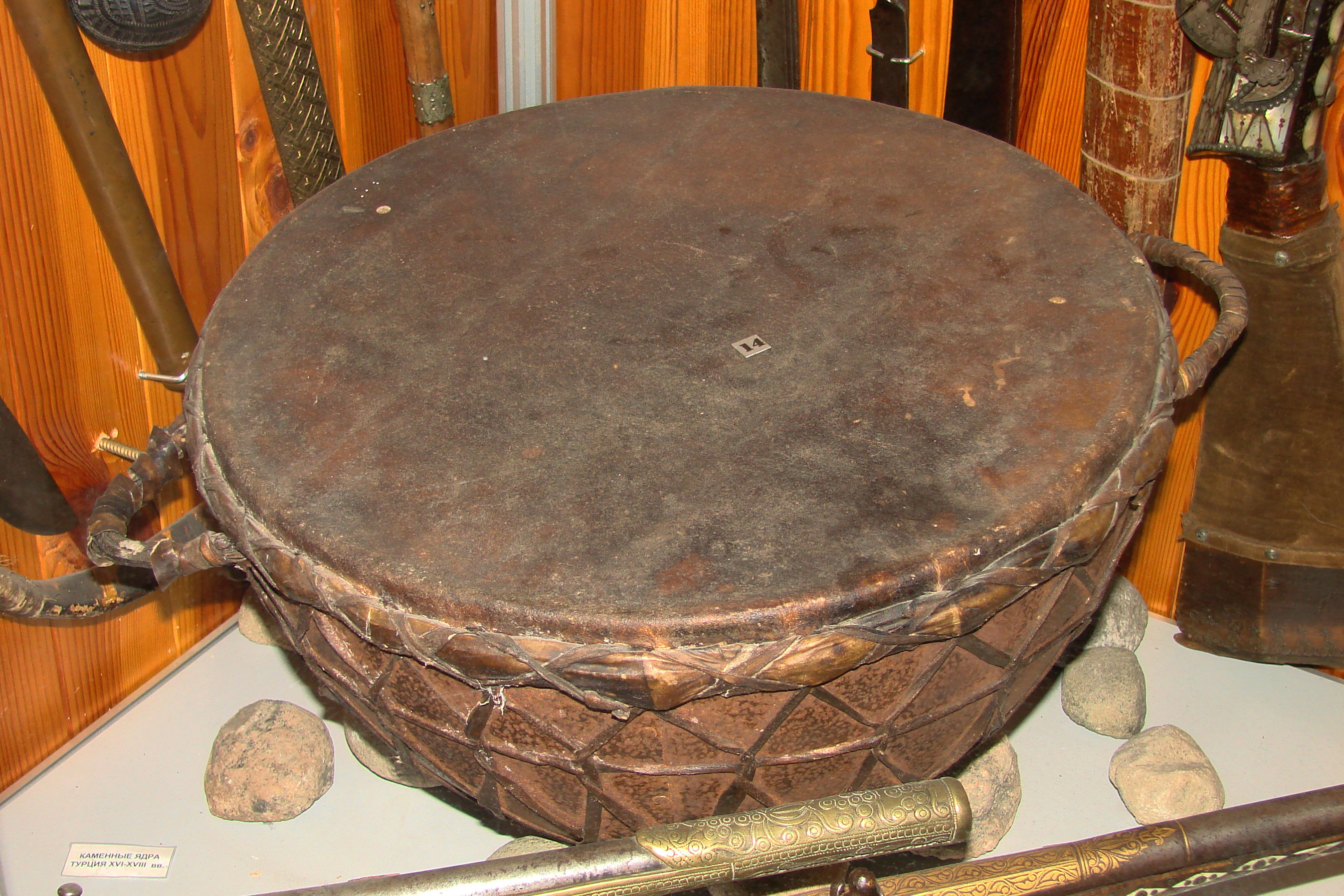 Украина, Запорожье, Тулумбас (барабан) в Музее истории оружия